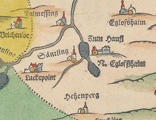 Ausschnitt aus den Bairischen Landtafeln von 1568